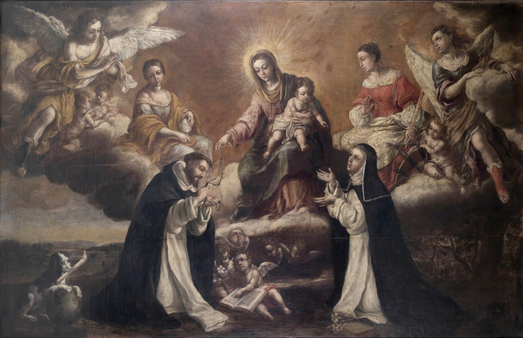 Esta obra representa a la Virgen del Rosario acompañada por Santo Domingo de Guzmán, fundador de la Orden de los dominicos, y por Santa Catalina de Siena. Esta obra fue adquirida en el año 2008 por la Junta de Andalucía para ser depositada a continuación en el Museo de Bellas Artes de Sevilla.